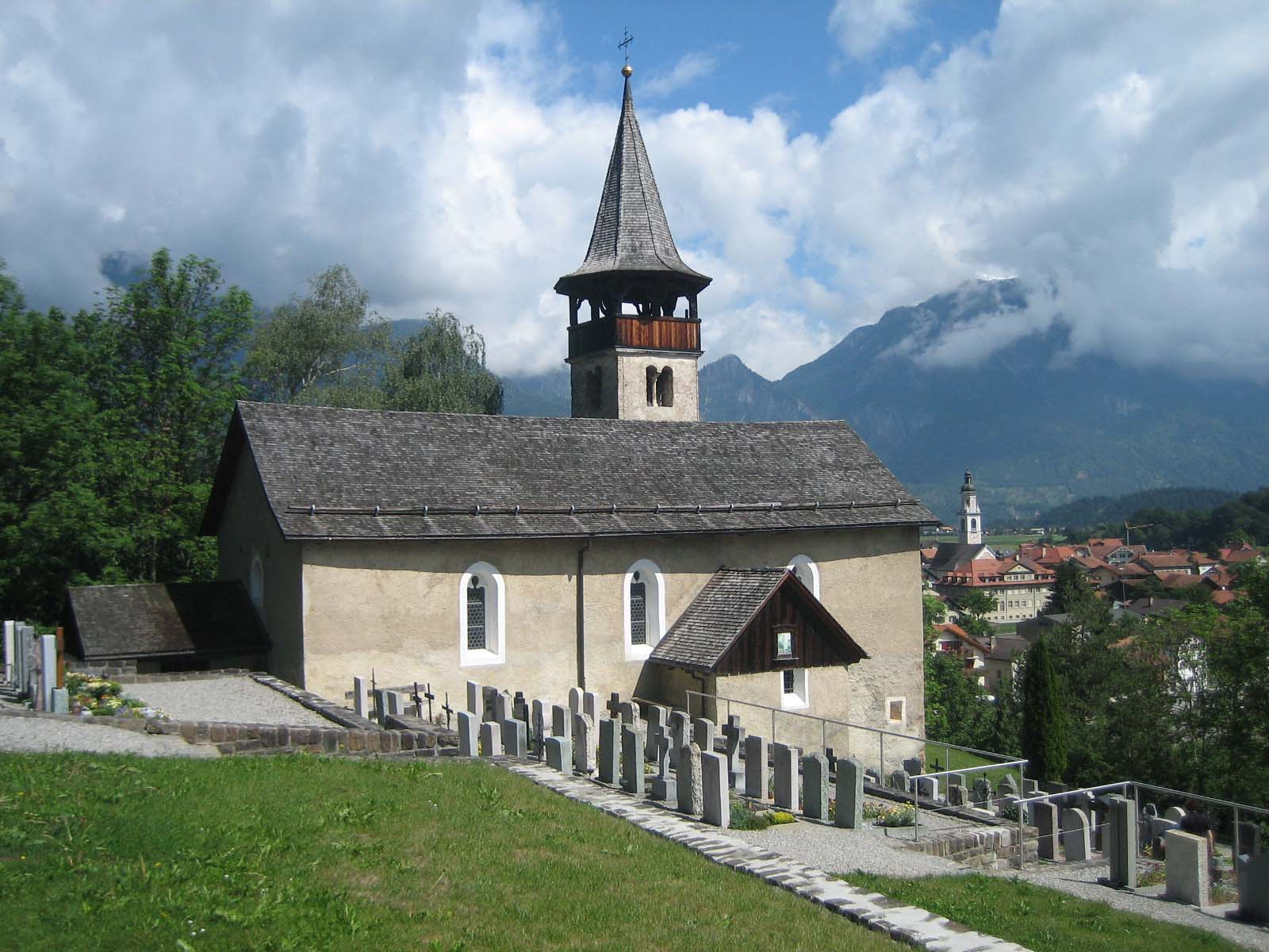 Die Bekehrung des Paulus